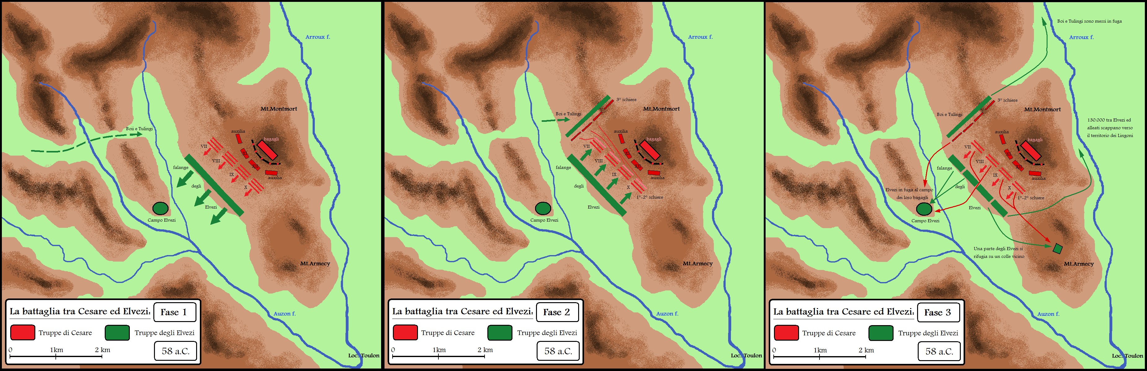 La battaglia tra Cesare e gli Elvezi a 25 km sud di Bibracte nel 58 a.C.